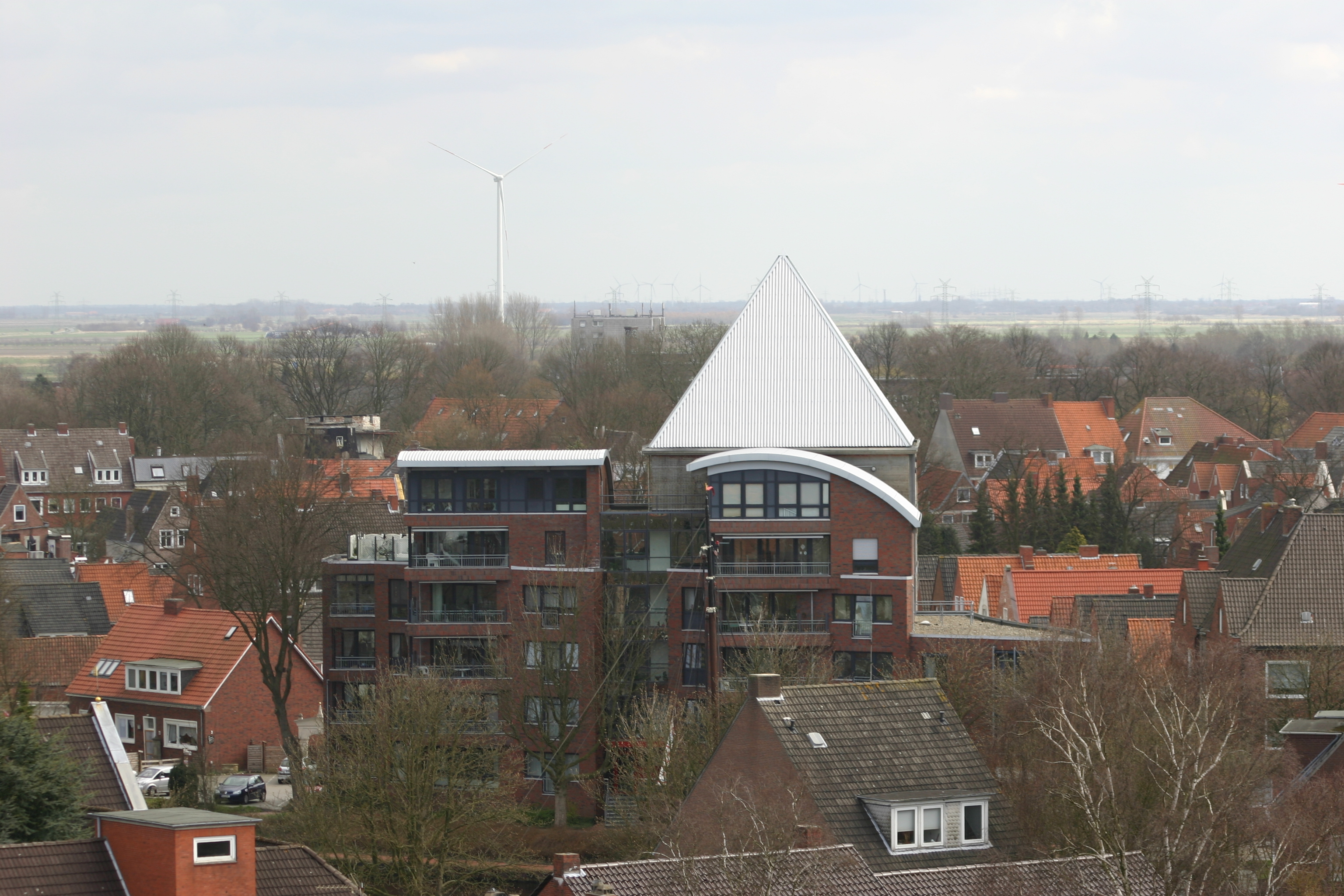 Apartmenthaus am Falderndelft in Emden – im Hintergrund (mit spitzem Dach) ein ehemaliger Bunker, in dem jetzt Versorgungseinrichtungen des Hauses untergebracht sind